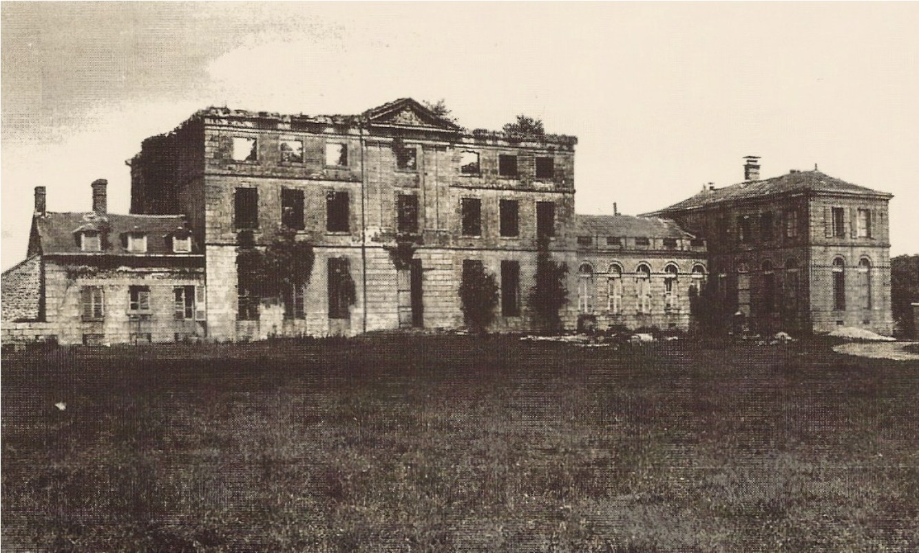 Mathilde de Montesquiou-Fézensac hérite du château de Hauteville à Charchigné dans le département de la Mayenne en 1902, mais mineure, la gestion de la propriété est confiée à sa tante Lady Hélène Standish, née de Pérusse des Cars et son oncle Lord Henry Noailles Widdrington Standish of Standish. Ce château est détruit par un incendie le 13 novembre 1922. Photographie prise après le sinistre.